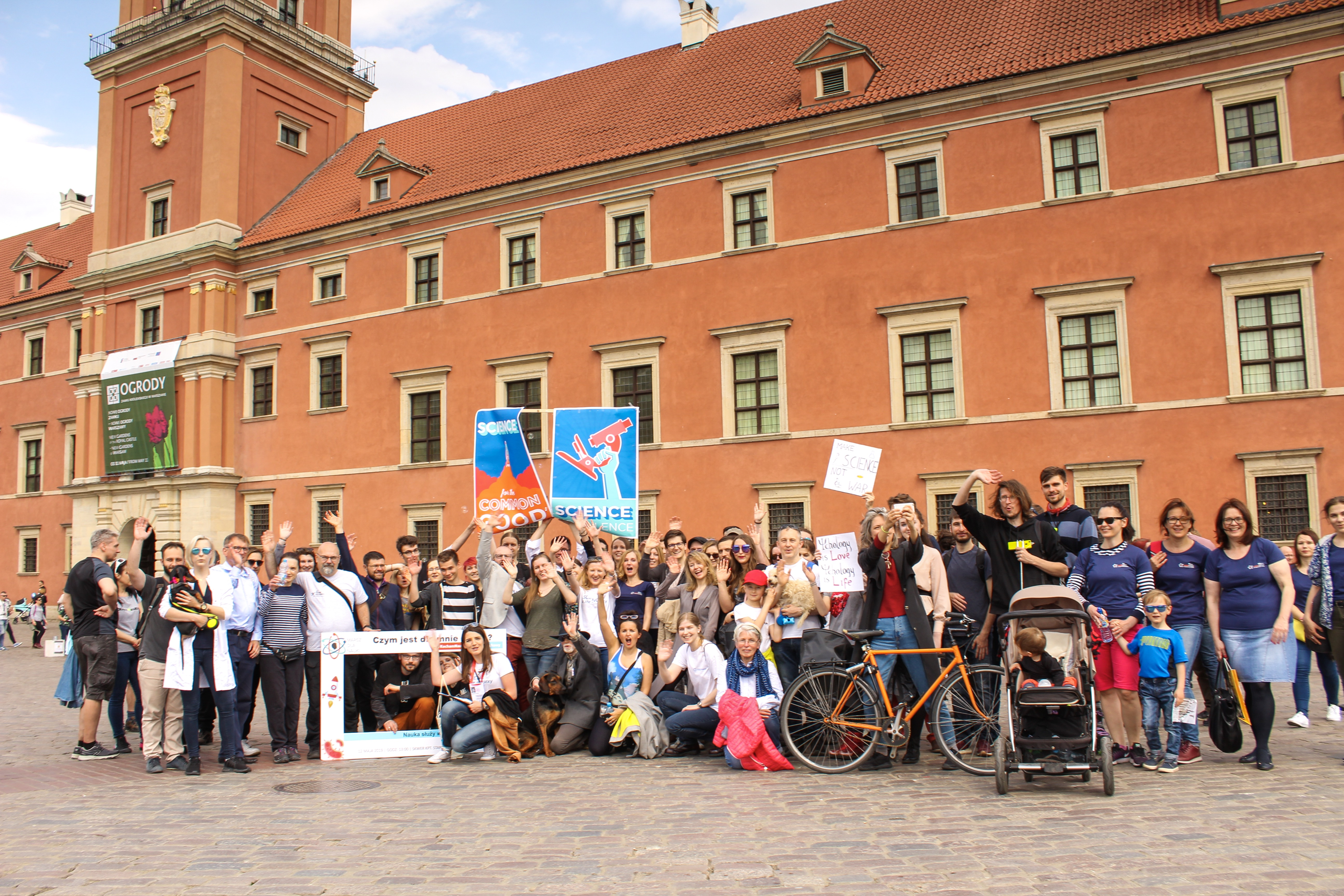 permission=